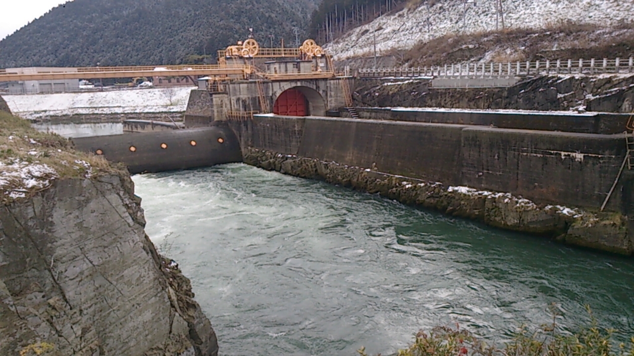 北上川脇谷洗堰